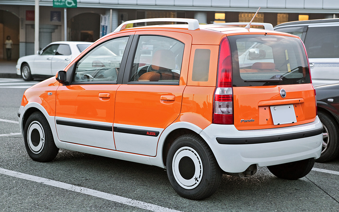 Fiat Panda II Alessi